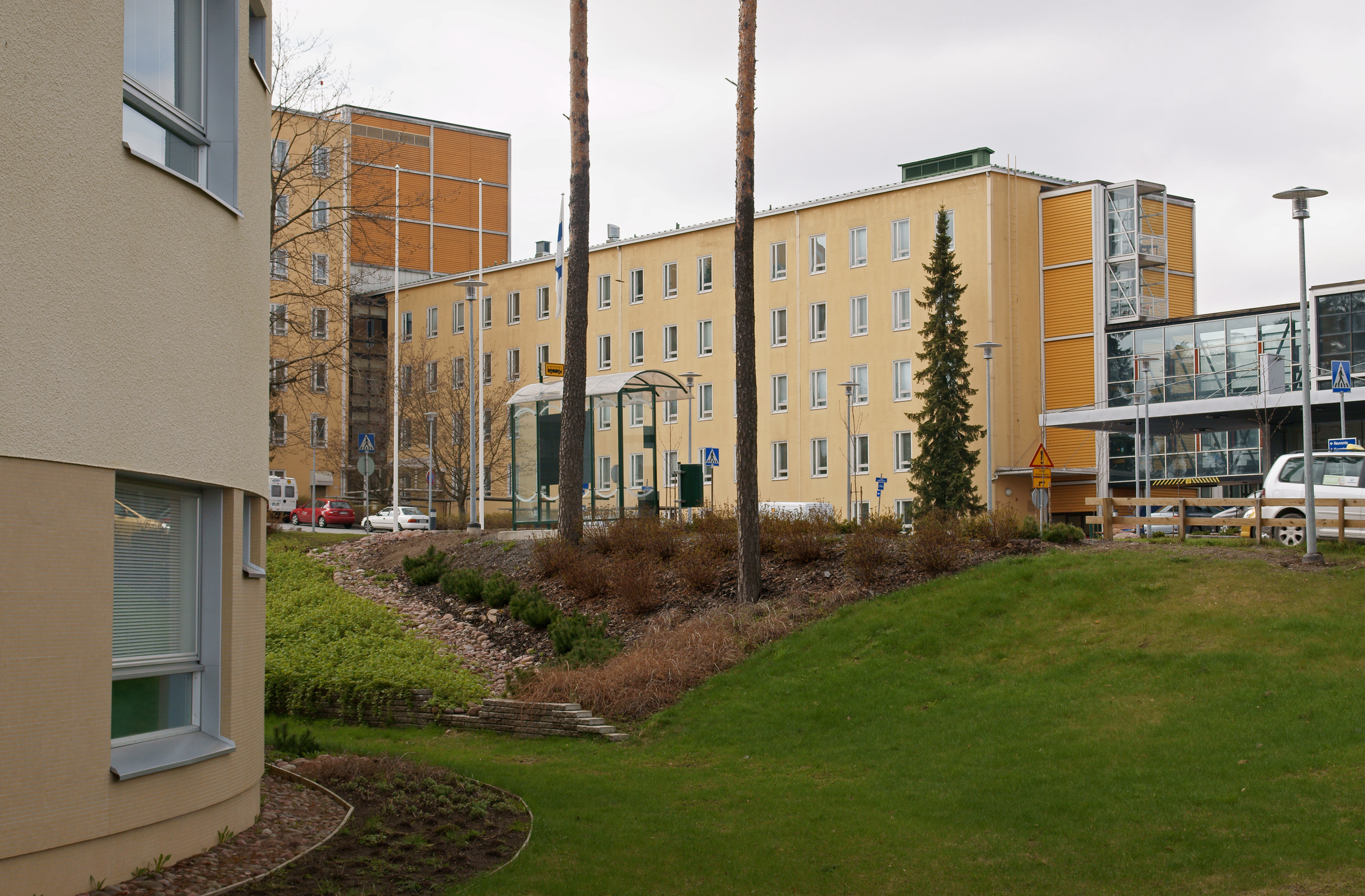 Satakunnan keskussairaala Porissa. Etualalla näkyy Tiilimäen koulun uutta rakennusta ja itse sairaala on taustalla.